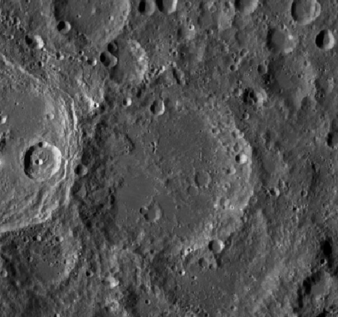 Cráter lunar Heaviside. (Imagen LRO)